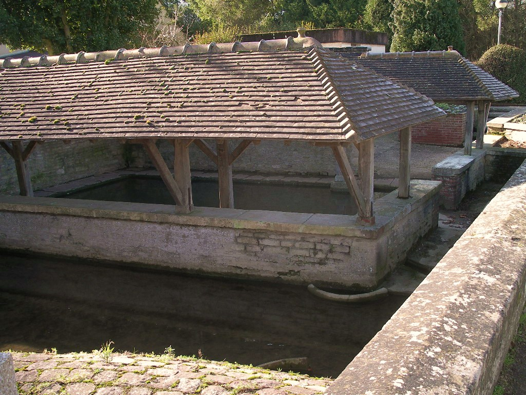 Lavoir d'Hérouvillette (Calvados)